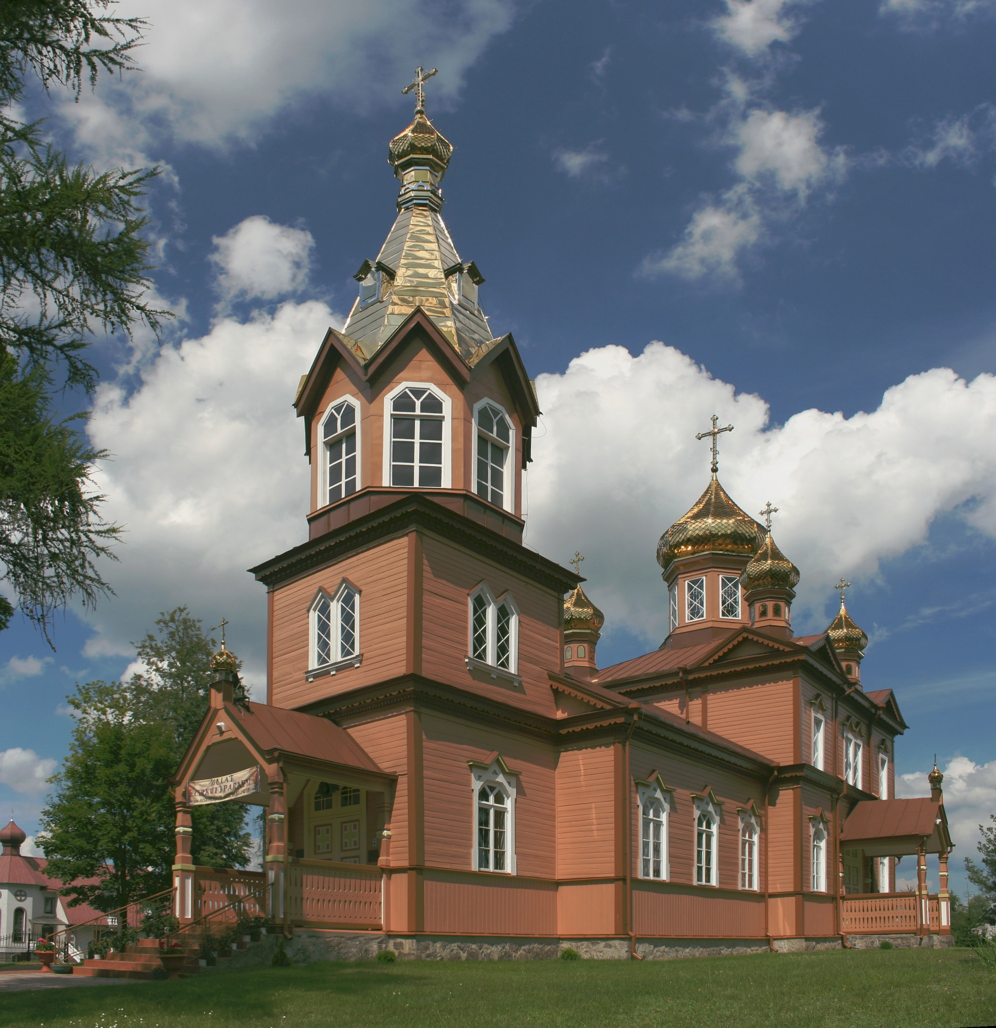 Cerwiew św. Mikołaja w Michałowie.